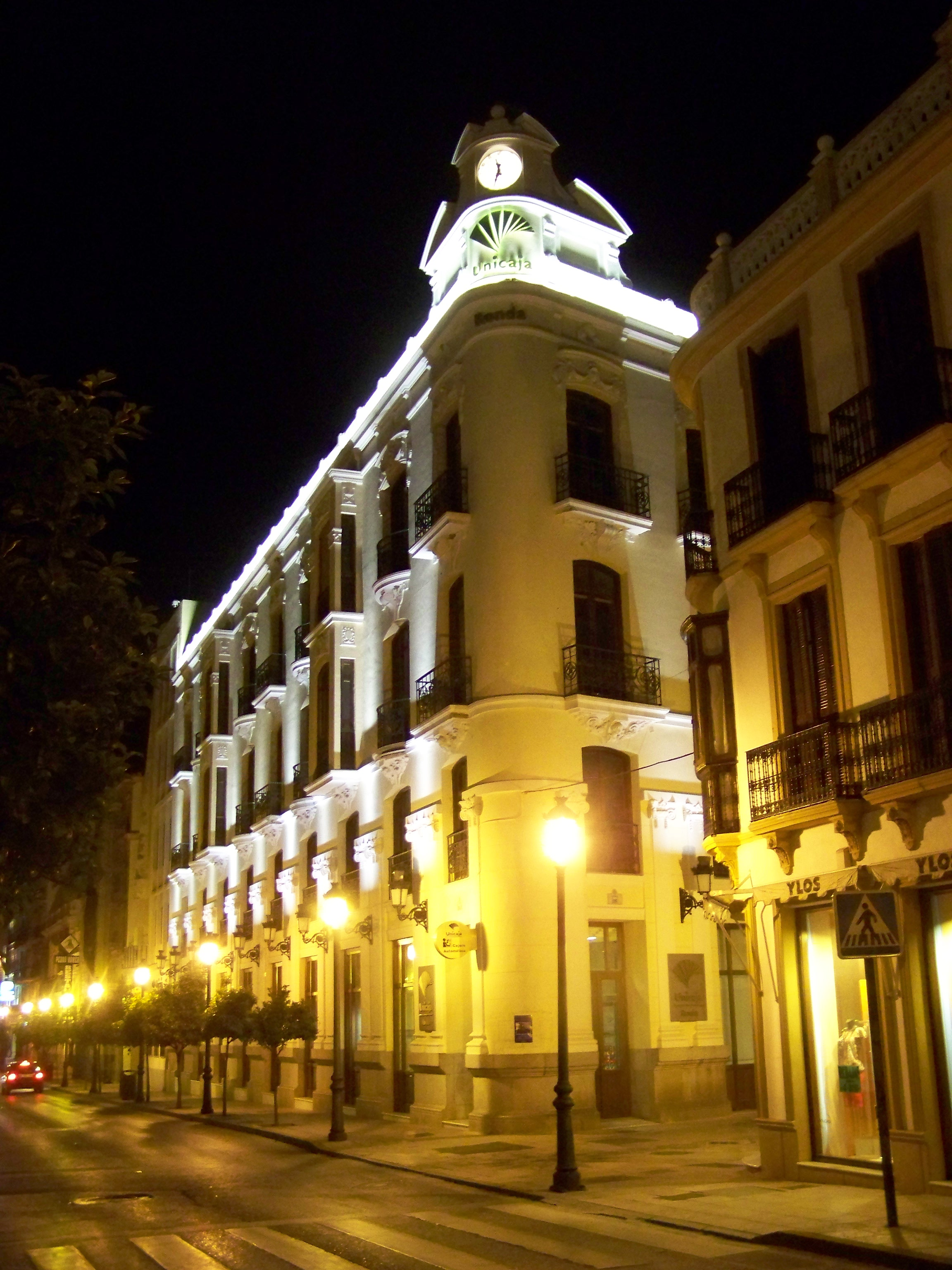 Sede de Unicaja en Ronda, Spain. Architect: José Manuel Benjumea Vázquez, 1950.